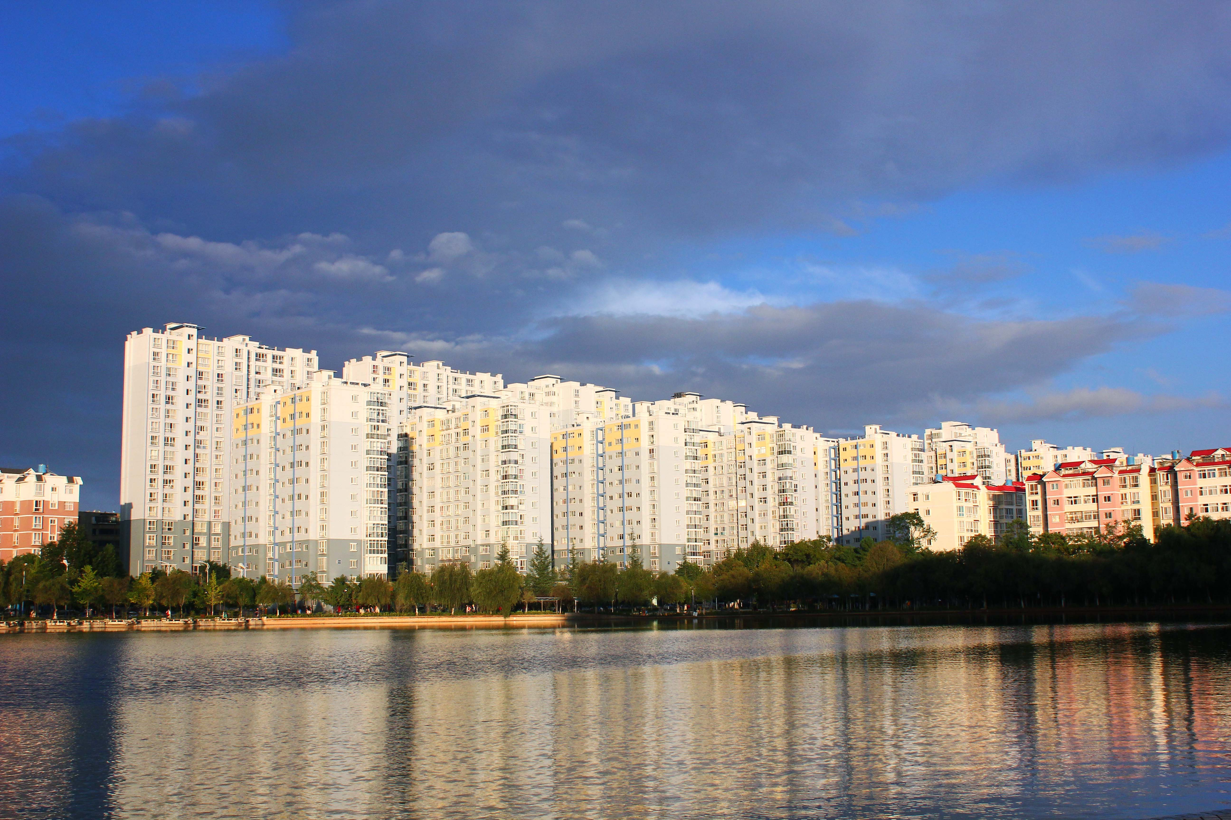 云南昆钢日月湖（旧称马宗塘），蓝色楼群为凌波三期